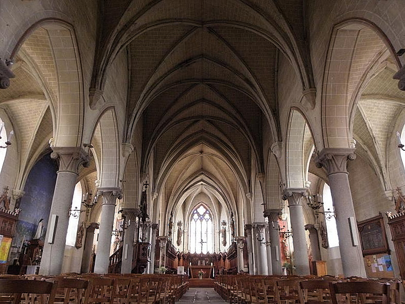 Intérieur de l'église Saint-Pierre-et-Saint-Paul de Baguer-Morvan (35).